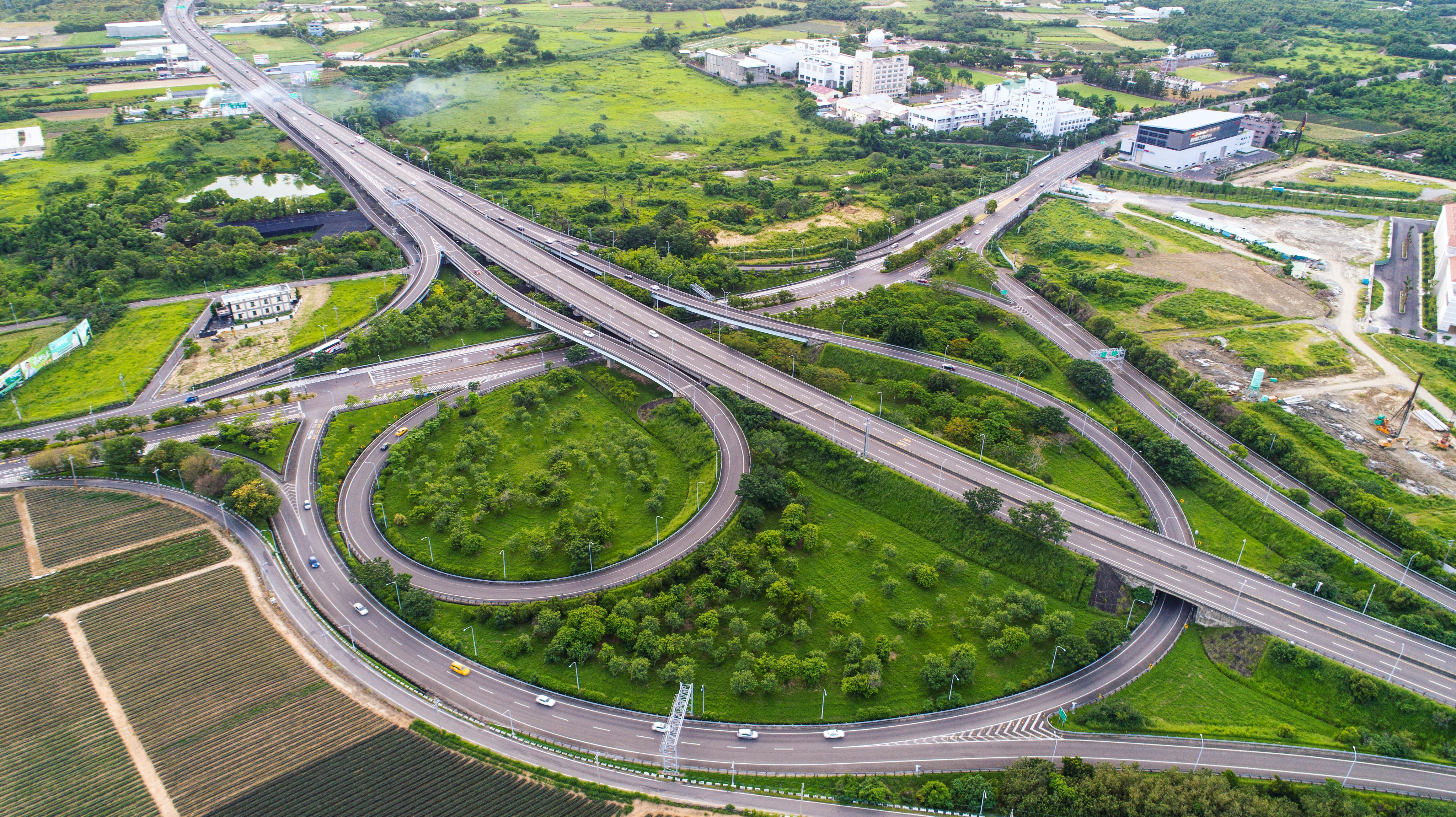 中文（台灣）: 東西向快速道路 台南關廟線